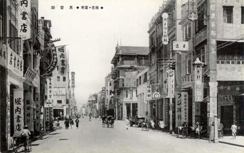 廣州市惠愛路。前方為永漢路口，可見城內大新公司。